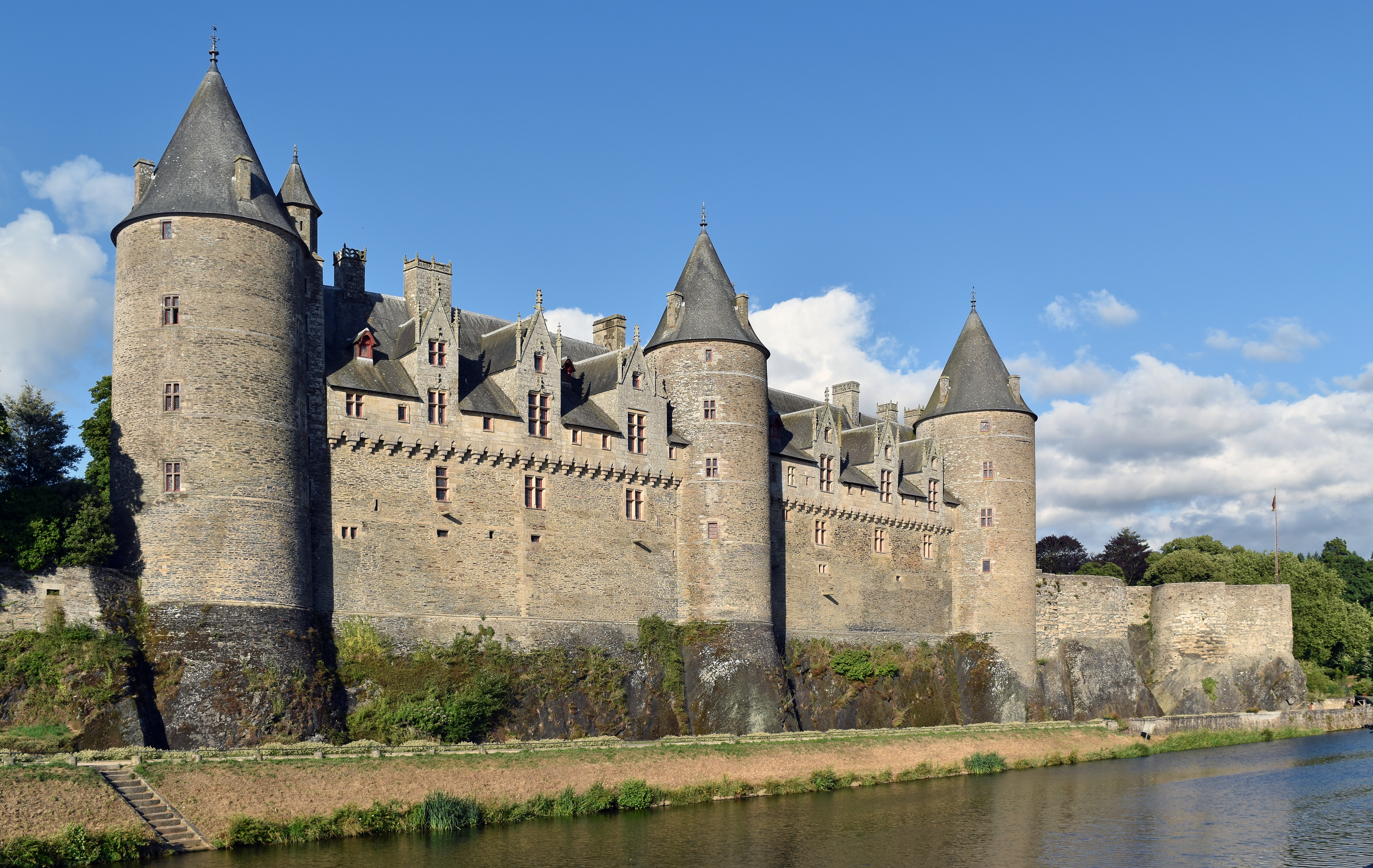 Château de Josselin, Morbihan, France .